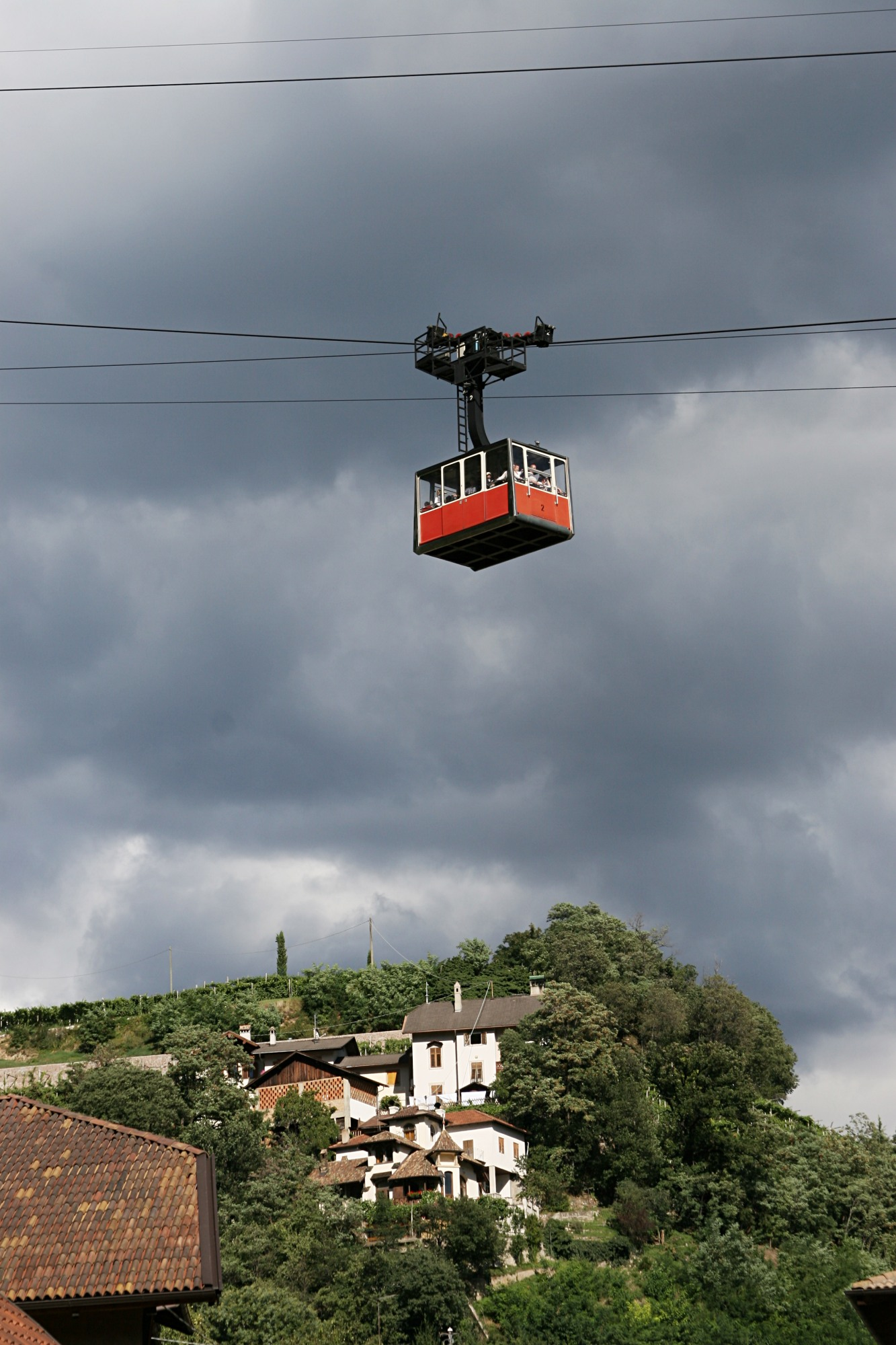 Ropeway between Bozen and Oberbozen in South Tyrol - Seilbahn von Bozen nach Oberbozen in Südtirol, in use from 1966 until 2007 own image, taken August 07, 2005 Photographer: Herbert Ortner, Vienna, Austria